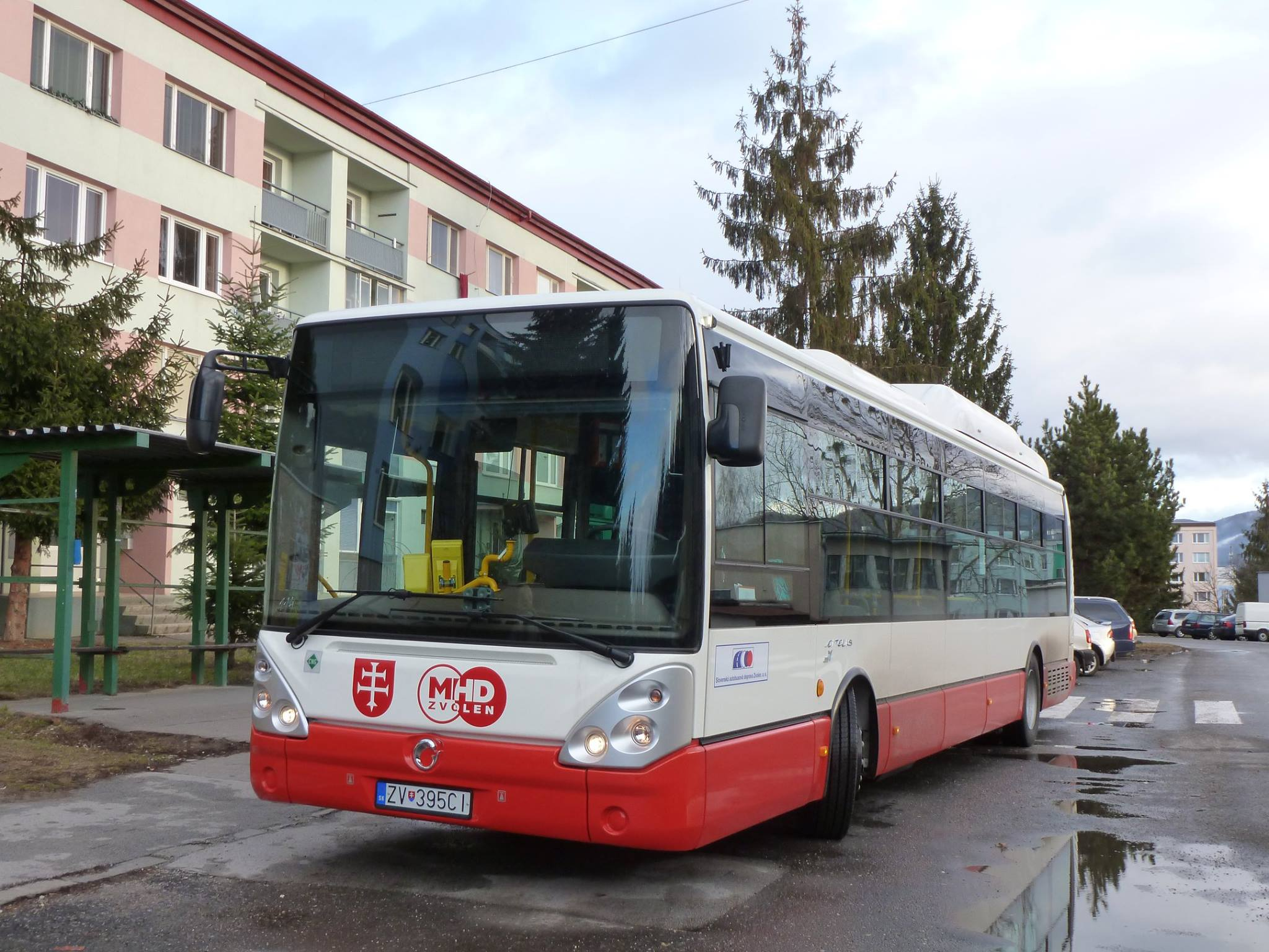 Jozef Brzula foto 2013